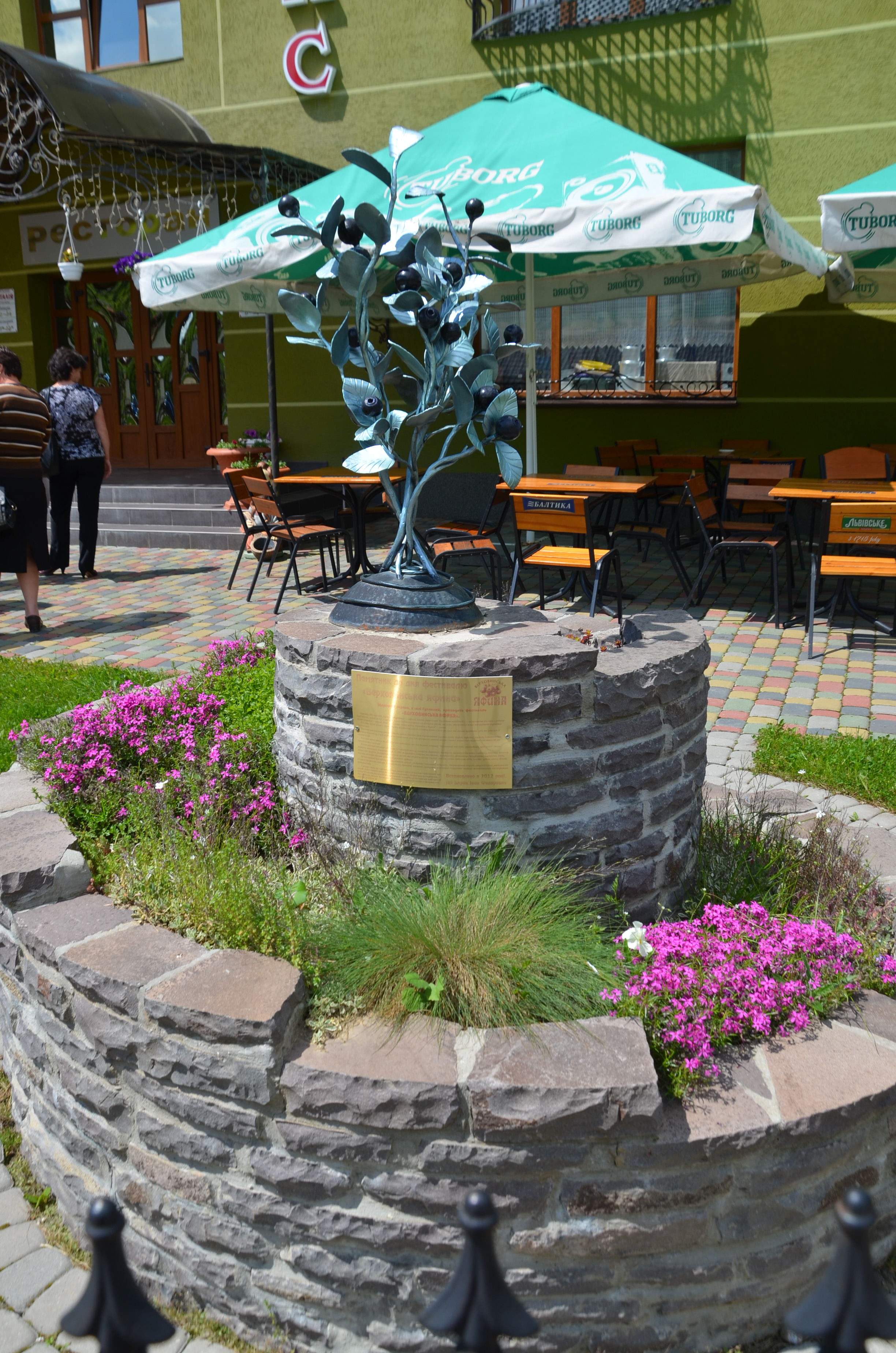 Пам'ятник яфині в селі Гукливий біля готелю "Наталія"